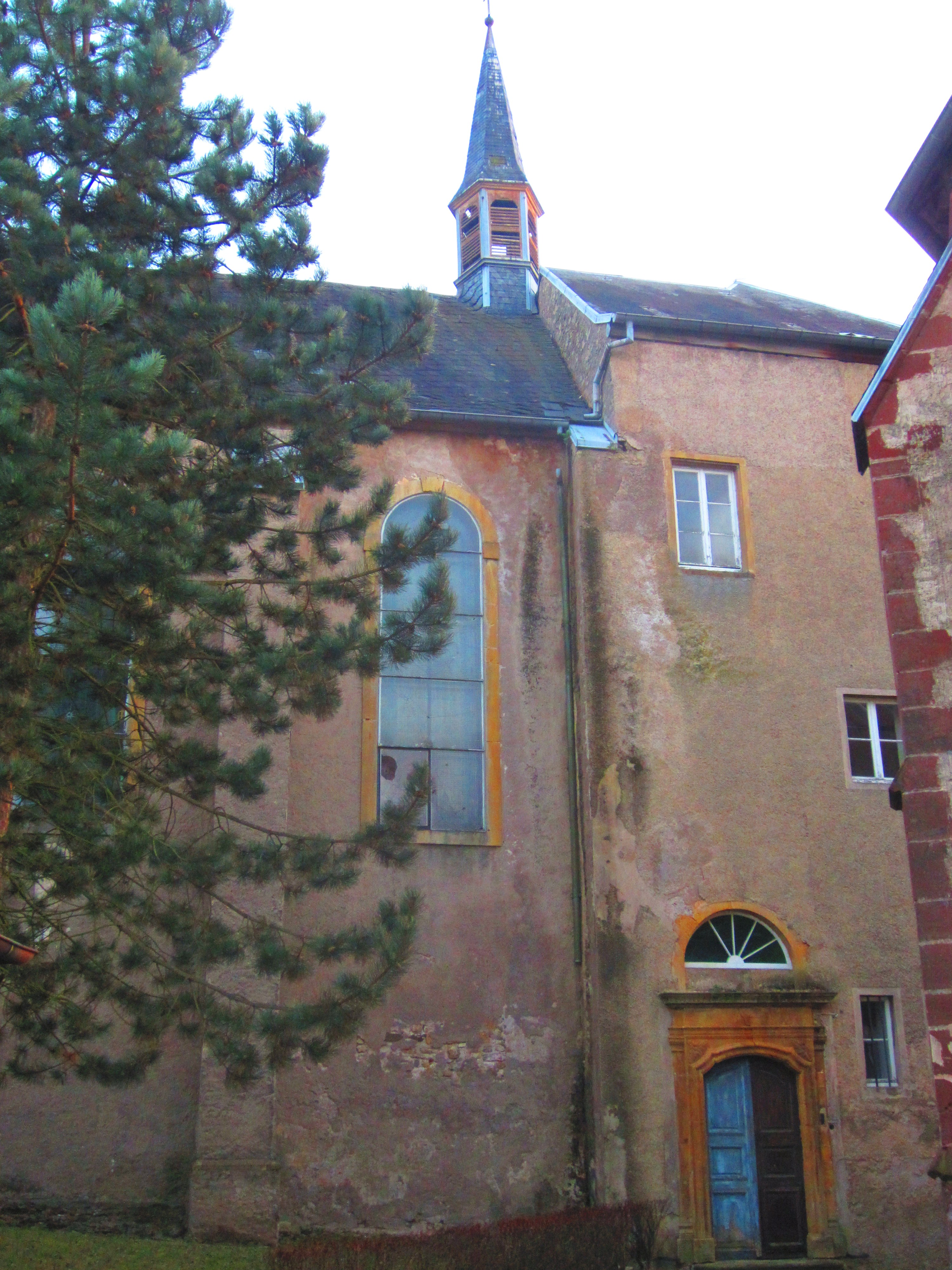 Rustroff chapelle du couvent des Franciscaines